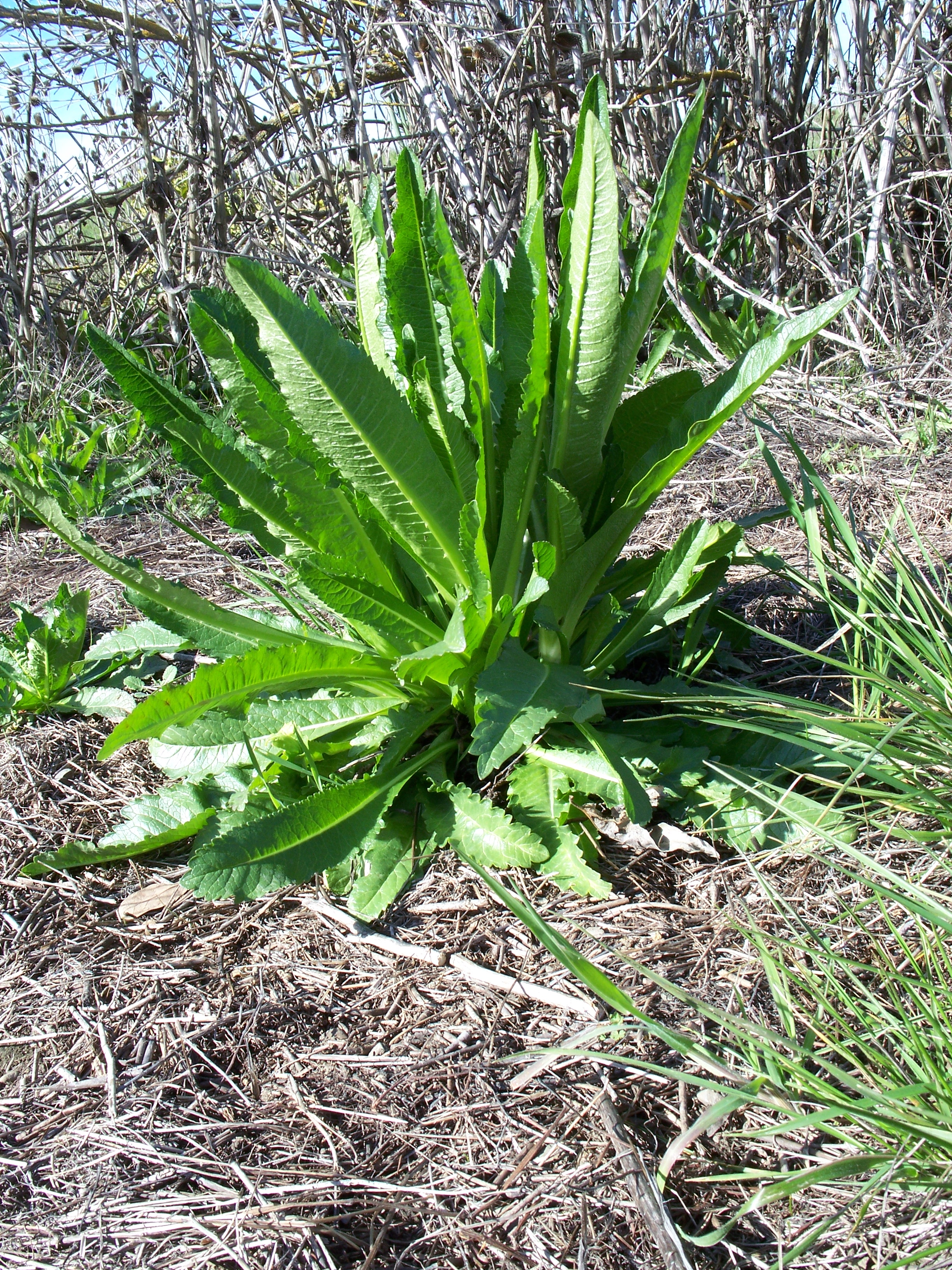 Dipsacus sativus Made in San Jose, California. Identified by Franz Xaver.